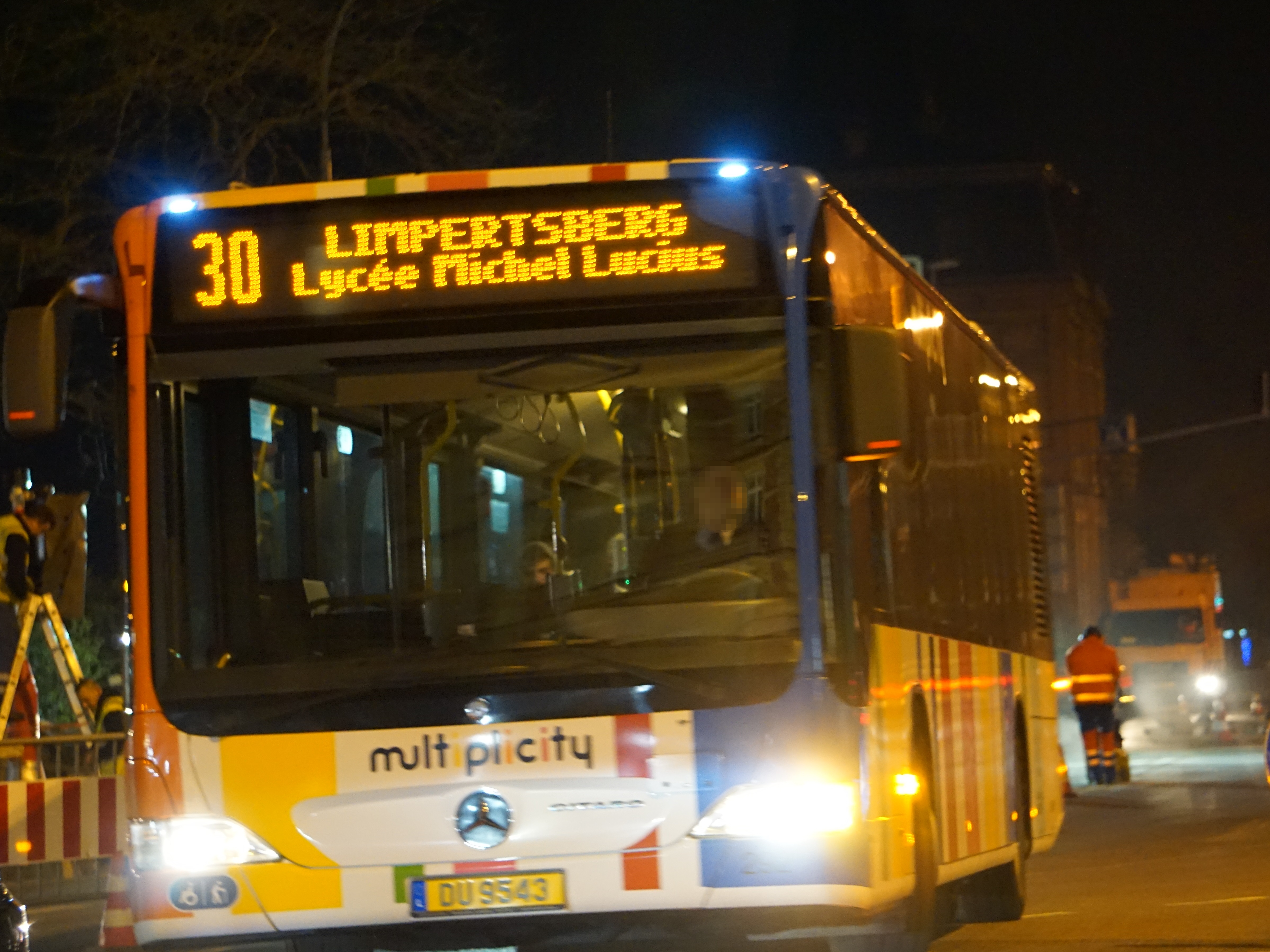 Lëtzebuerg, AVL Bus 292 Linn 30 op der Bréisselerplaz a Richtung Lampertsbierg